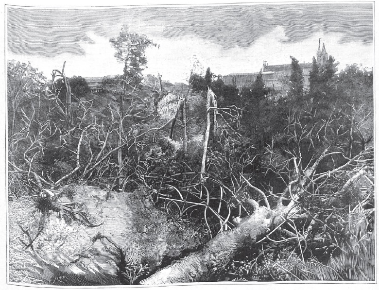 "Madrid — Destrozos producidos por el huracán del 12 del actual. Aspecto del paseo de las Lilas y pino de Alepo, secular, arrancado de raíz"